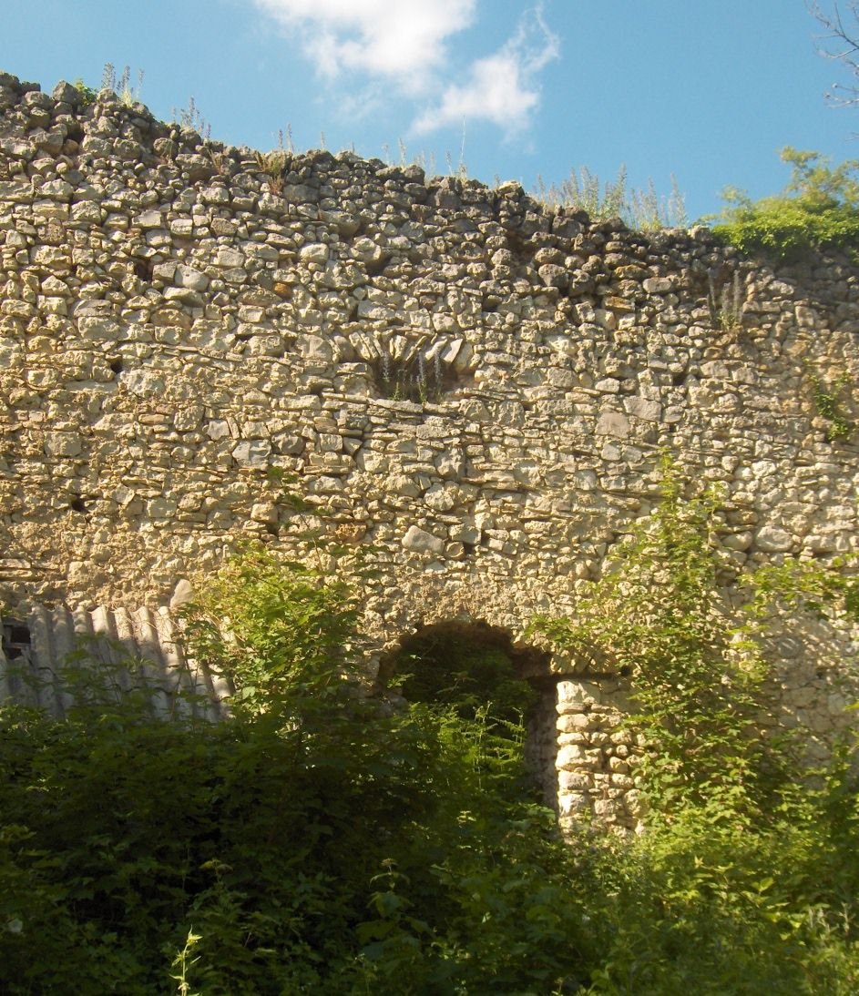 Fotografija gradinske utvrde Klinac kod Petrinje